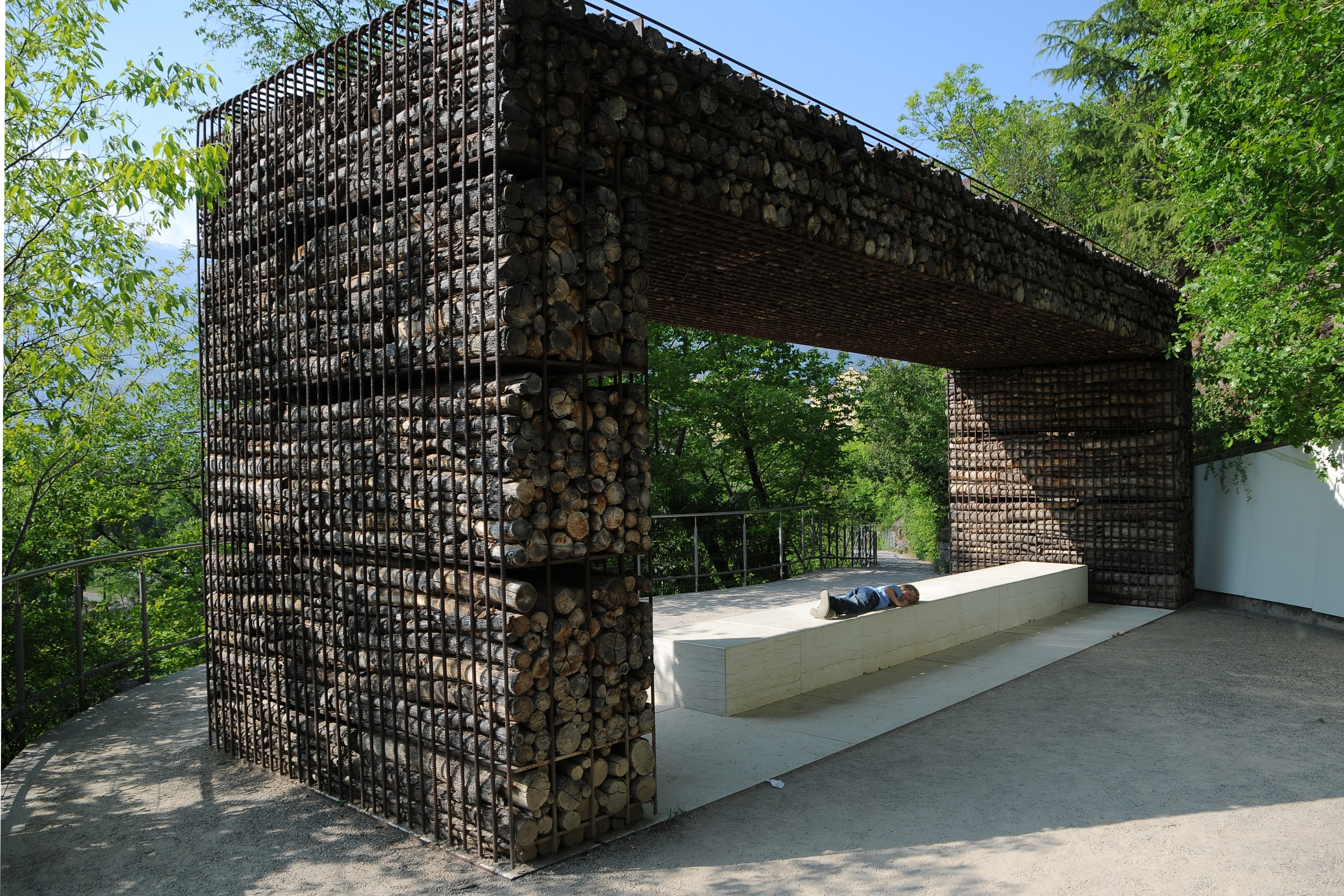 Die Gärten von Schloss Trauttmansdorff liegen am östlichen Stadtrand von Meran in Südtiro /Italien. Der nach seinem Wahrzeichen – Schloss Trauttmansdorff – benannte botanische Garten der Kurstadt Meran nimmt eine Fläche von rund zwölf Hektar ein.